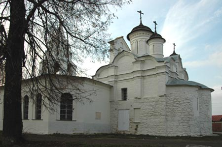 Коломна. Церковь Иоанна Предтечи на Городище